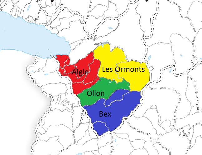 Carte du gouvernement d'Aigle / les quatre mandements.